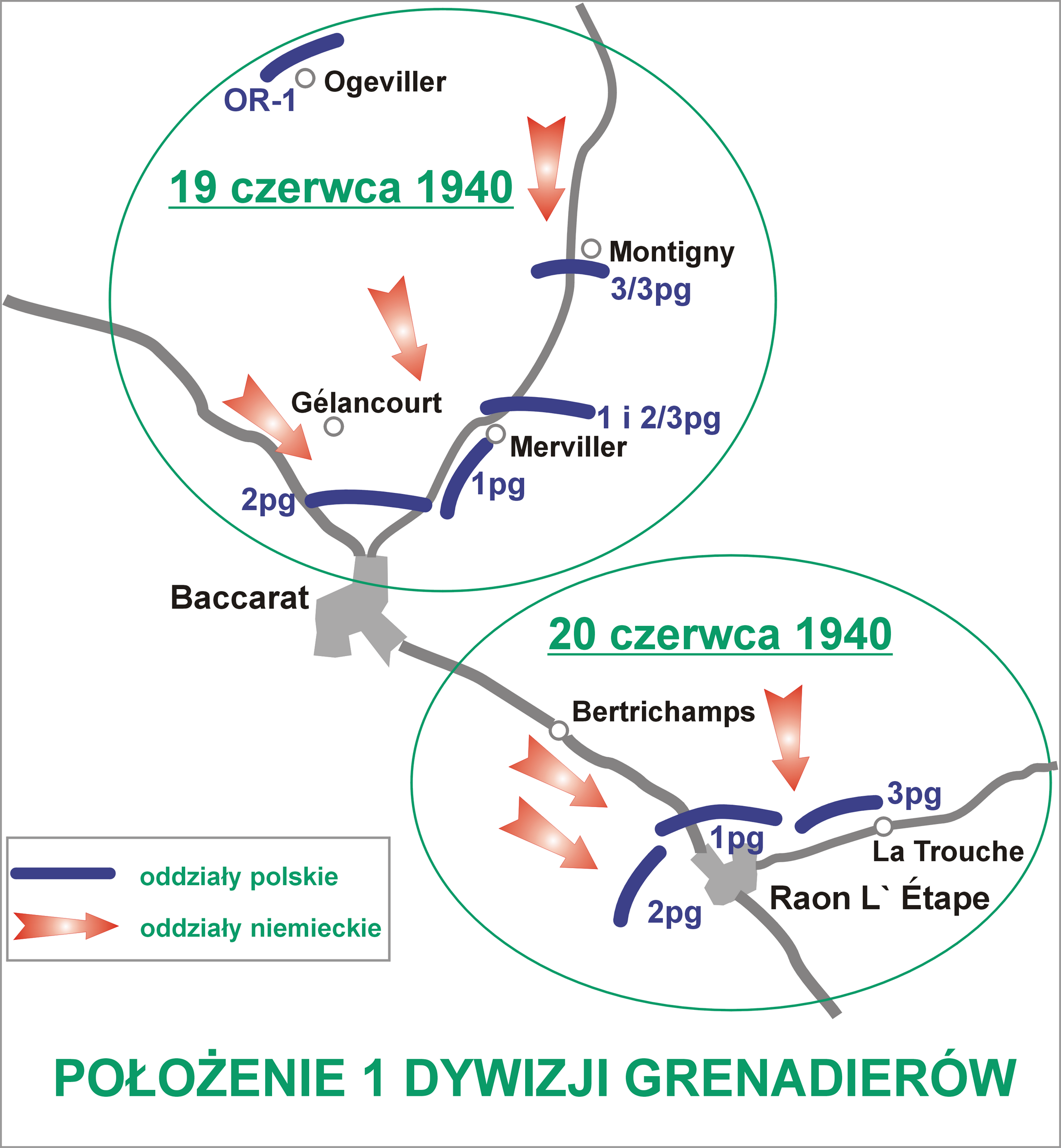 Położenie 1 Dywizji Grenadierów w dniach 19 - 20 czerwca 1940 r